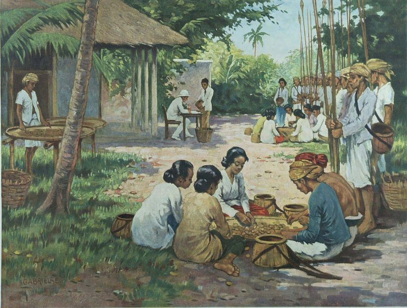 Schoolplaat. De plaat behoort tot de serie Henri Zondervan en is een uitgave van Wolters, Groningen.. Een nootmuskaatbedrijf op de Molukken